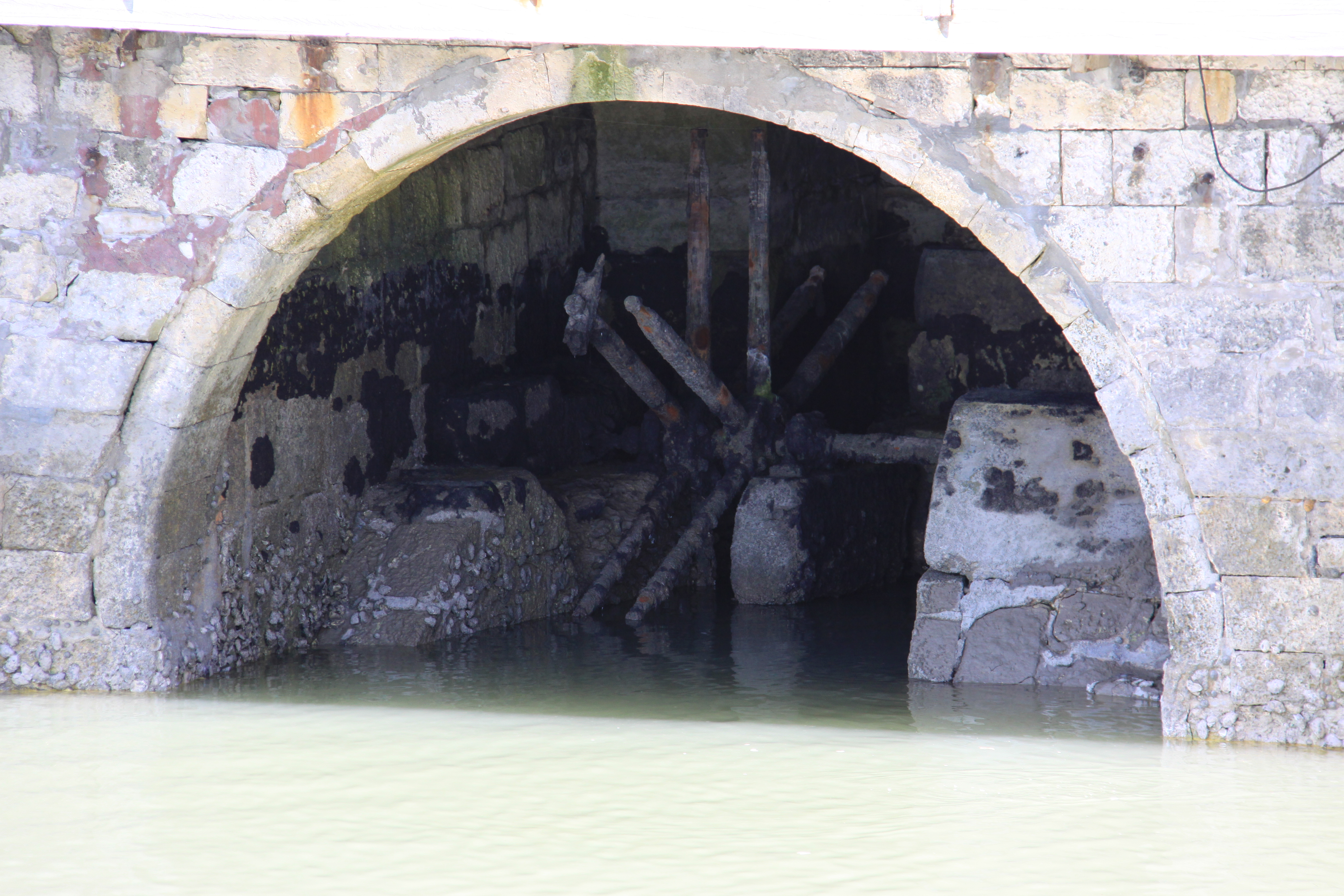 Les restes de la roue à aube et l’ arbre de transmission. Cette roue a été placée sous le moulin, à l’intérieur d’ une cavité cylindrique dans laquelle l’ eau s’ engouffre. Loix-en-Ré, Île de Ré, Charente Maritime, France.